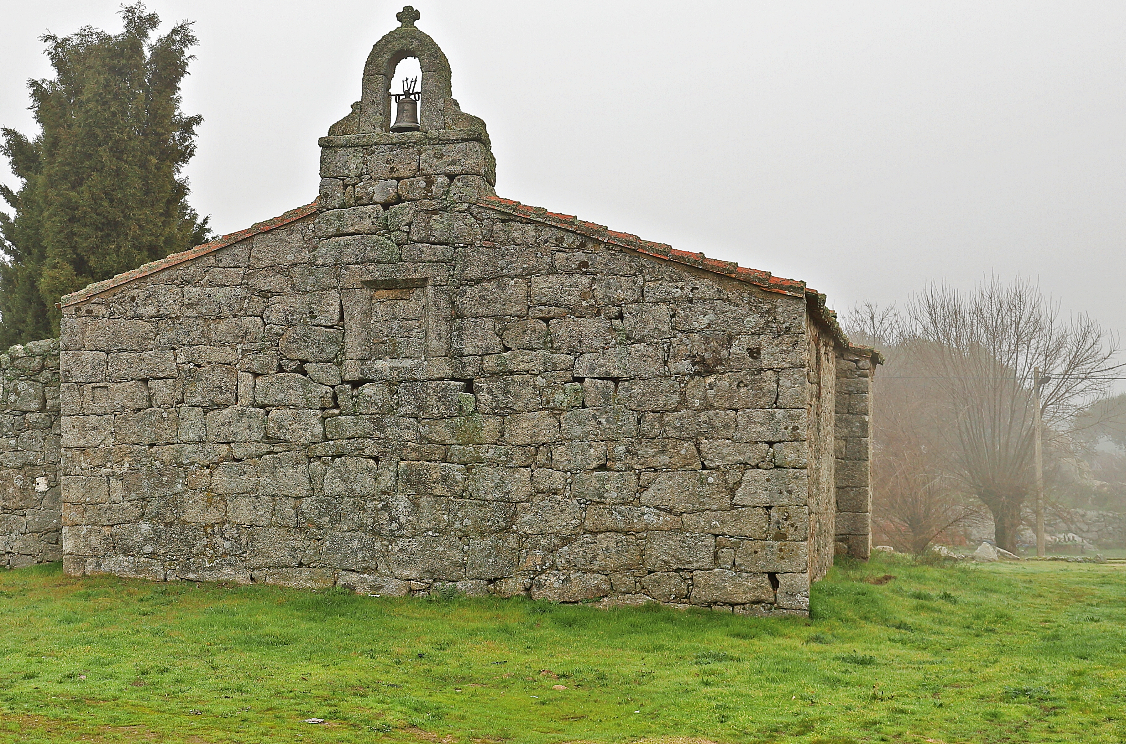 Moralina, municipio de la comarca de Sayago, en la provincia de Zamora